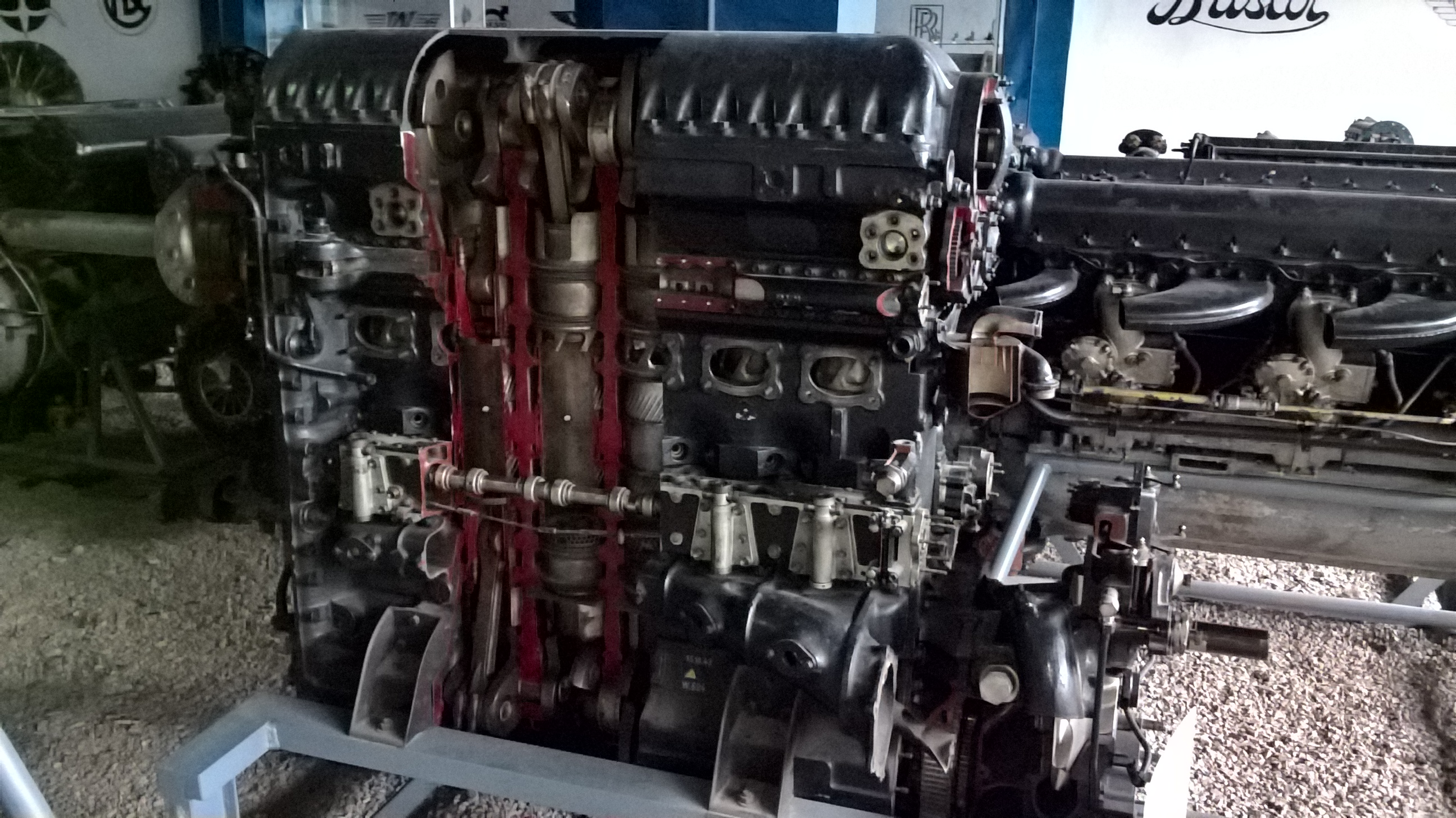 Niemiecki 6-cylindrowy wysokoprężny silnik rzędowy Junkers Jumo 205 z 1940 r. ze zbiorów Muzeum Lotnictwa Polskiego w Krakowie.